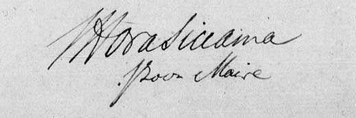 Handtekening maire Johan Hora Siccama (1778-1829) in 1811